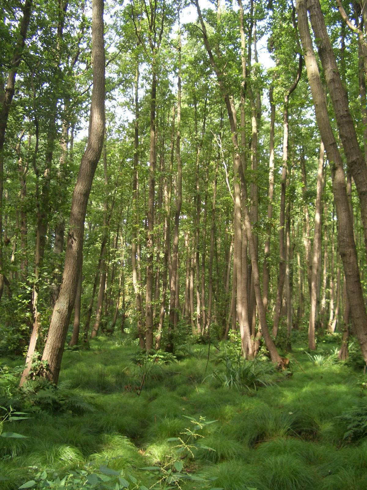 Naturschutzgebiet Ribnitzer Großes Moor.